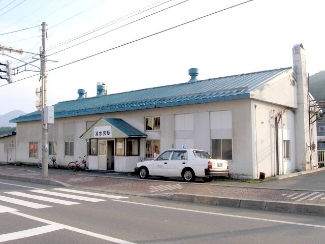 Shimizusawa Station in Sekisho Line, Japan